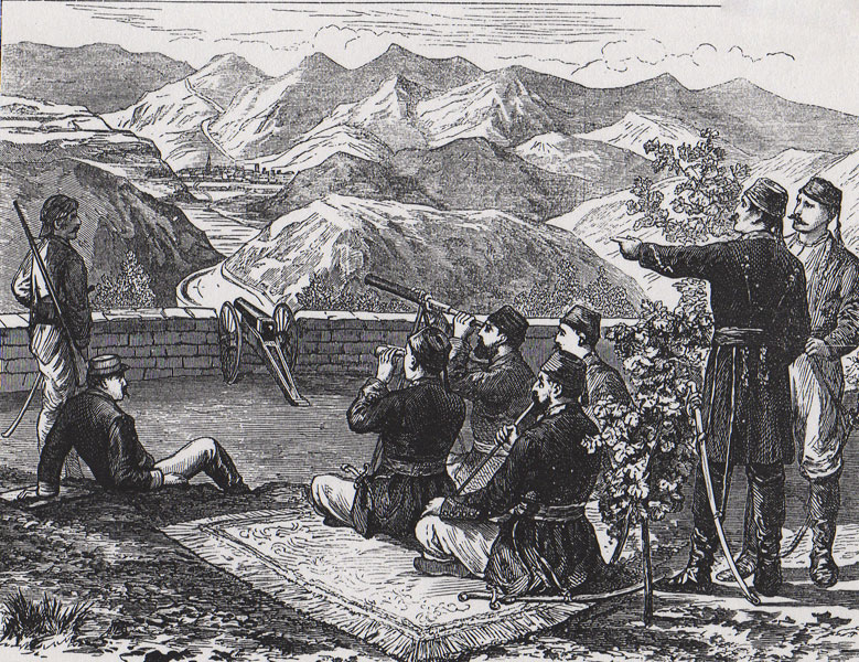 Ахмет-паша рассматривает Княжевац